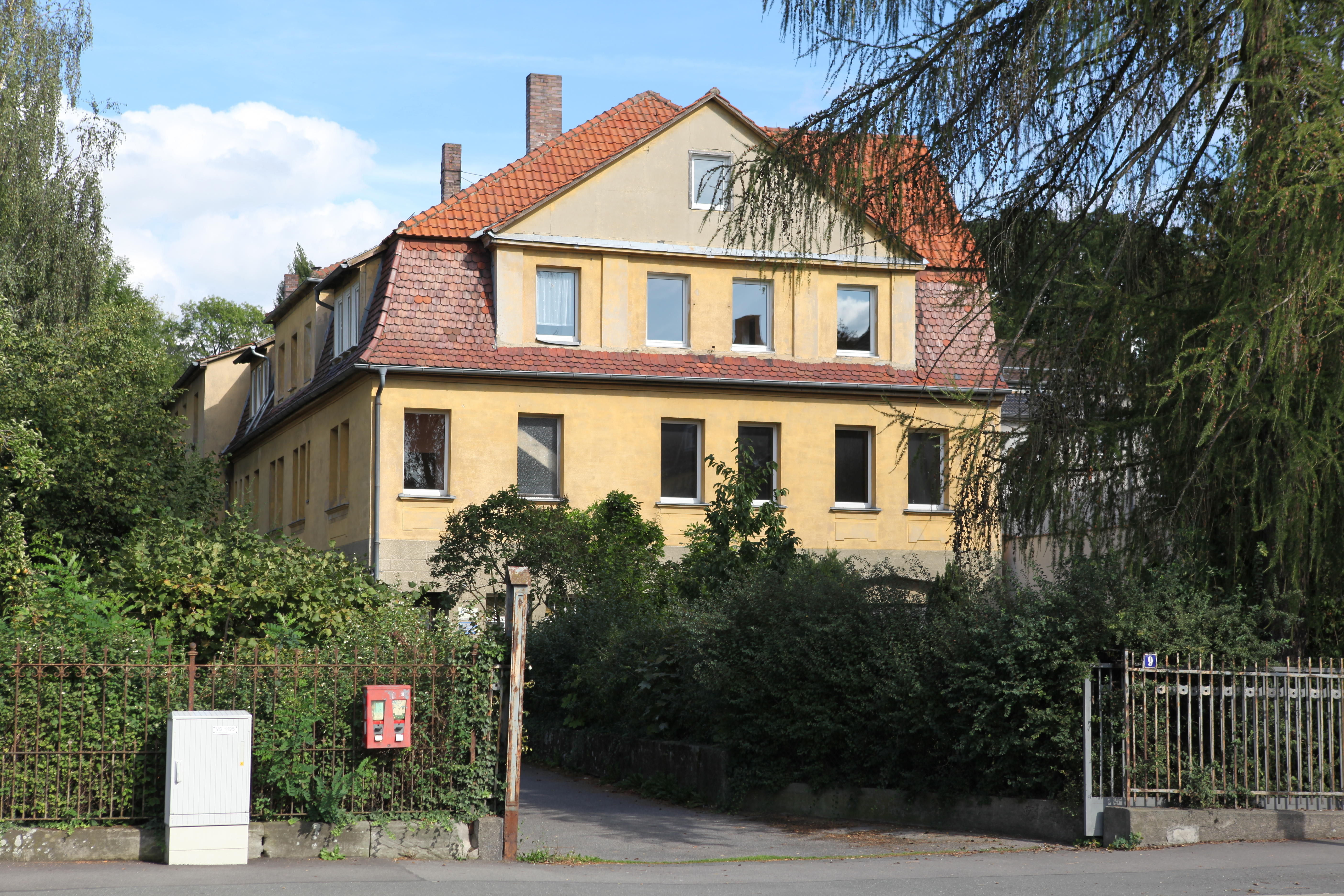 zweigeschossiges Wohn- und Lagerhaus, entstand um 1910, Goethestraße 9 in Coburg